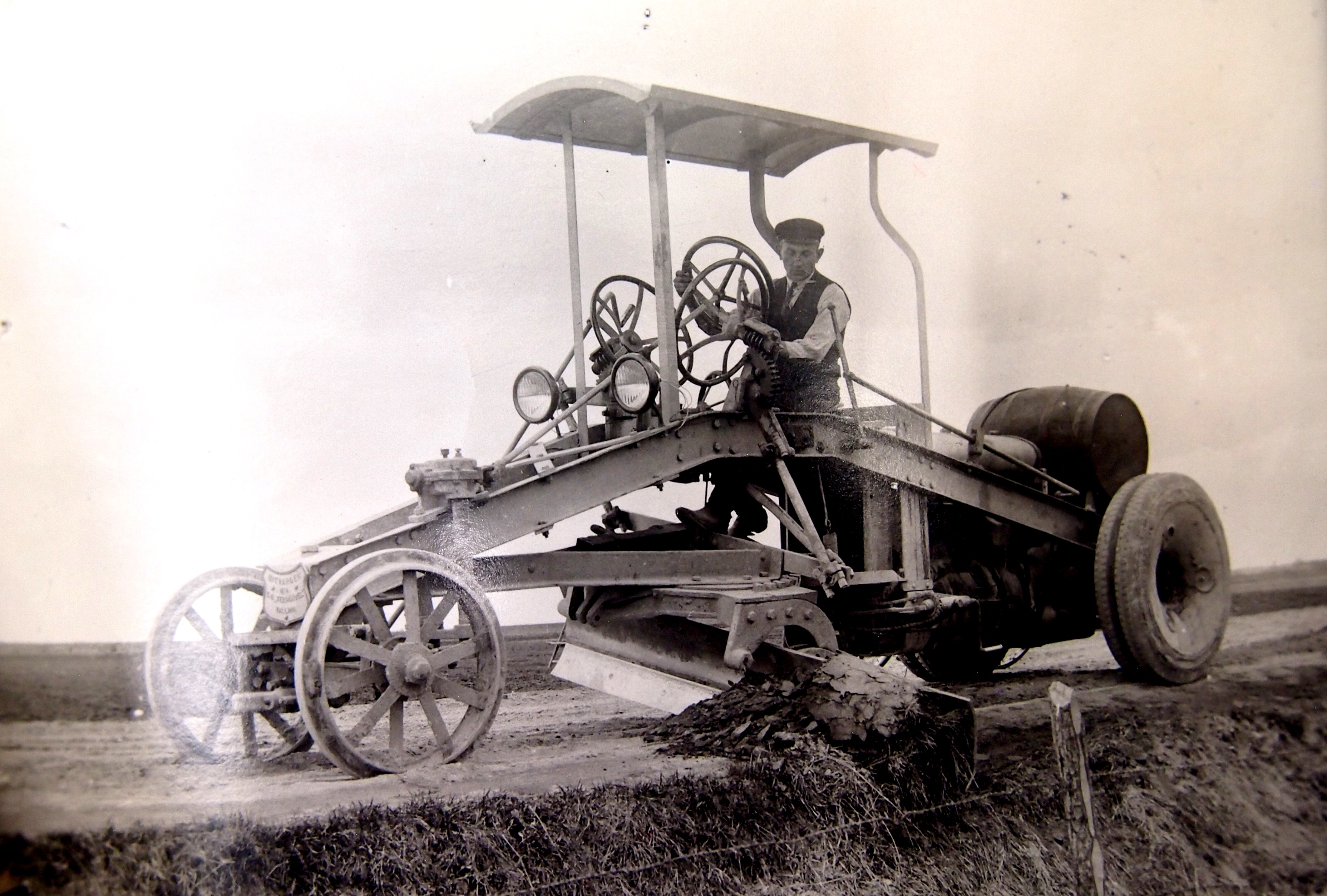 1928. a sõnastati teedeministeeriumi tehnikaosakonna visioonidokumendis, et Eesti teede põhitüübiks on kordaseatud kruusatee ja selle korrashoiu masinaks on roopaid äralõikav ja teed tasandav teehöövel. Fotol teehöövel Bitvargen-Ilmarine töötamas 5. mail 1928 Pärnu-Tallinna maantee 13. kilomeetril.